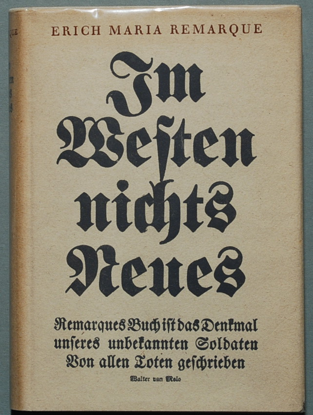 Remarque, Erich Maria: Im Westen nichts Neues. Roman. Berlin: Propyläen 1929, 287 Seiten. Erstdruck mit Original-Verlagsumschlag (Wilpert/Gühring² 3)